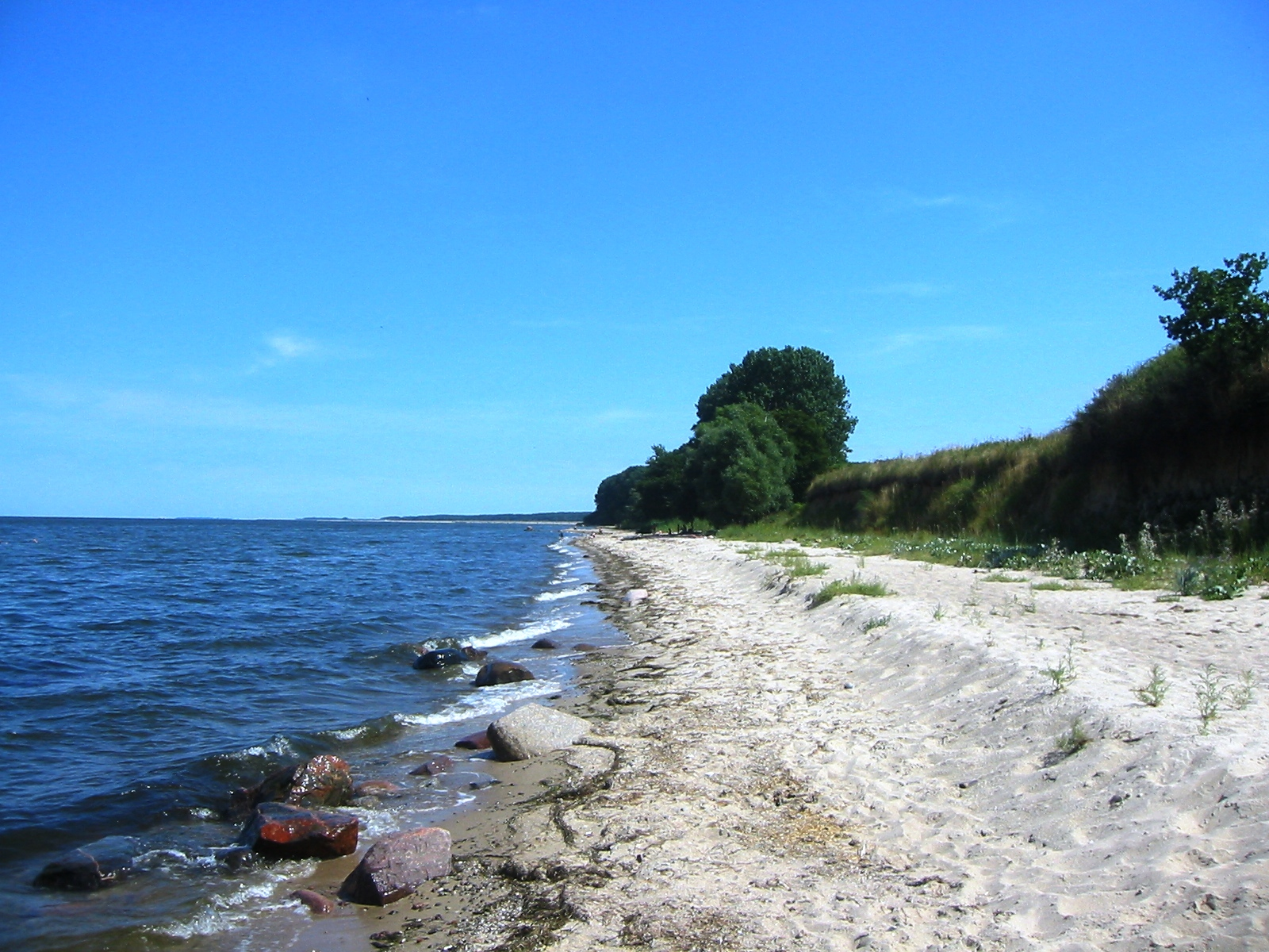 Blick auf den Strand von Vierow, ein Ortsteil der Gemeinde Brünzow in Vorpommern-Greifswald (Mecklenburg-Vorpommern). Die Aufnahme entstand kurz hinter dem Hafen Vierow mit Blickrichtung Lubmin.